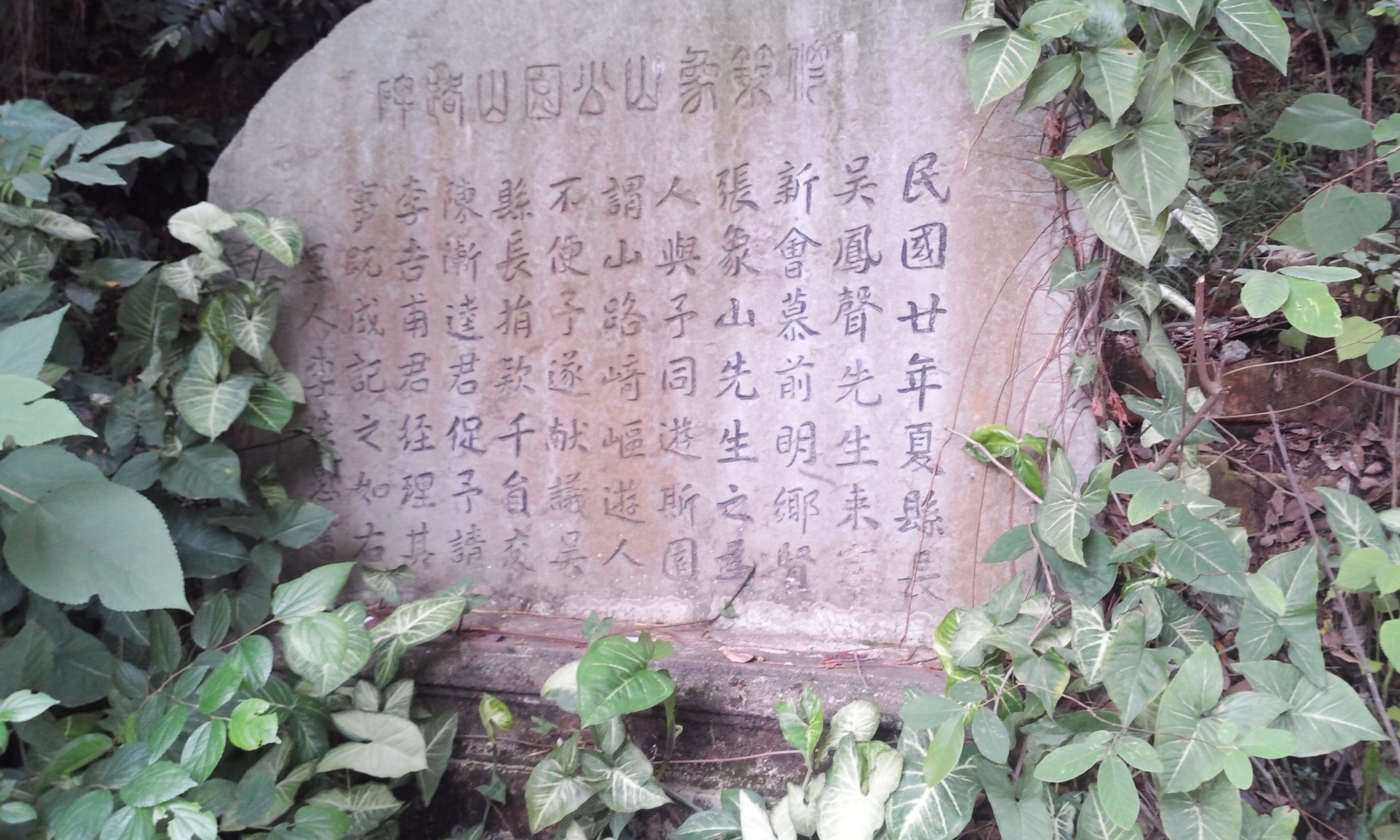 象山公園，位於中國廣東江門市新會區